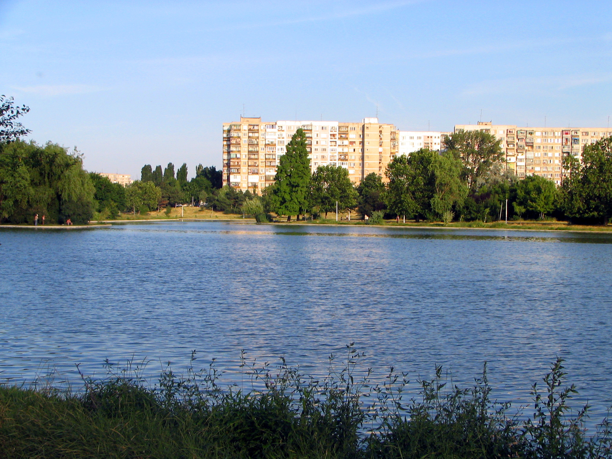 Lacul IOR/Titan, Bucureşti; 3 iulie 2006